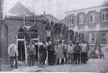 Photo de l'école en construction